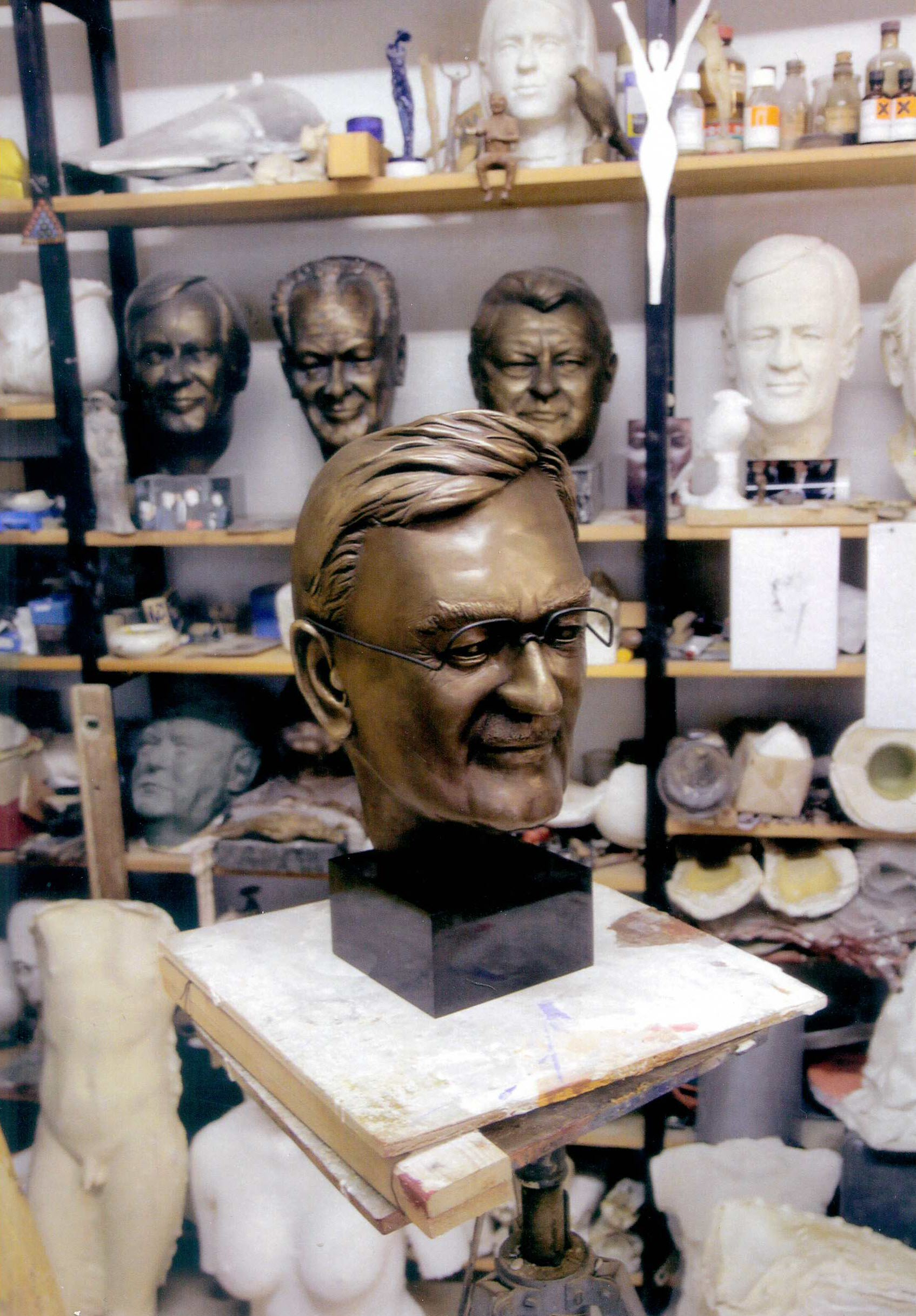 Atelier Ansicht aus dem Jahr 2013